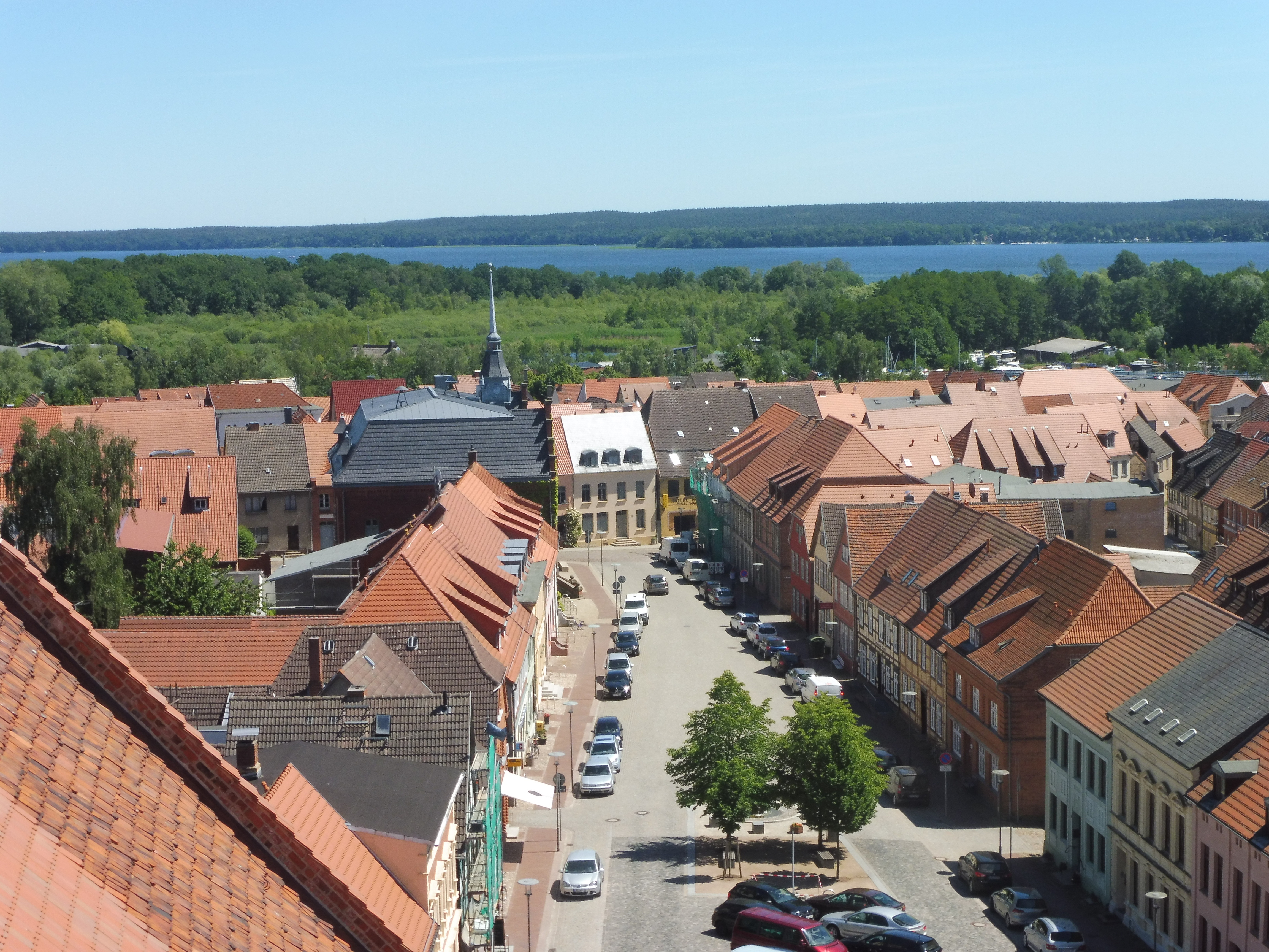 Marktplatz in Plau am See, an der linken Ecke das Plauer Rathaus, im Hintergrund der Plauer See, fotografiert vom Turm der Marienkirche.